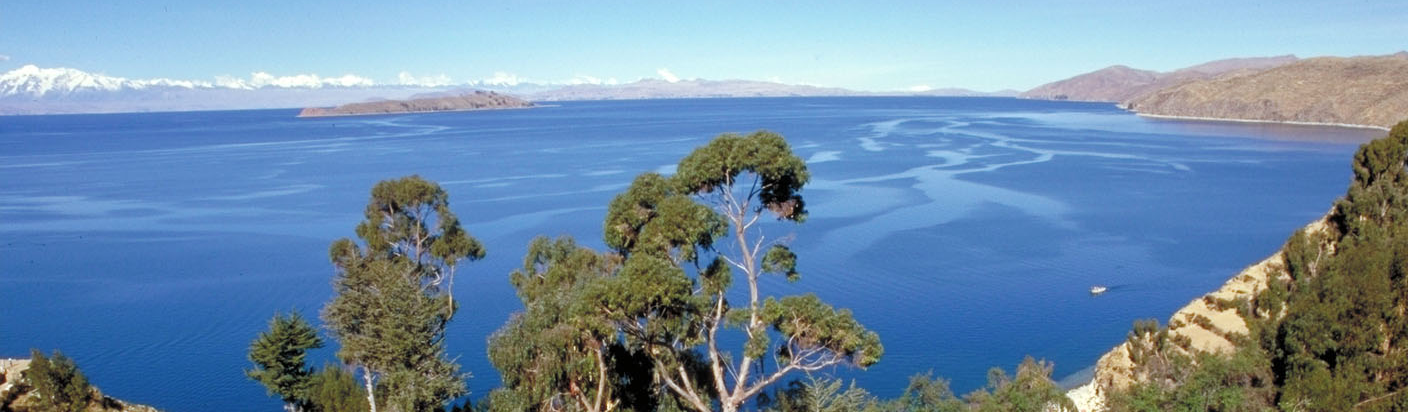 Panorama del lago Titicaca, Bolivia.